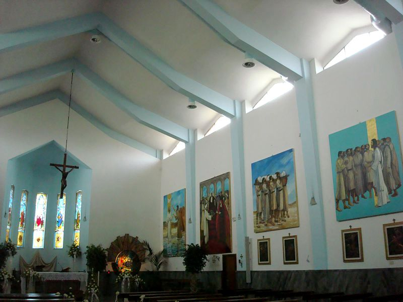 Interno della chiesa parrocchiale di San Giovanni Battista a Budoni.